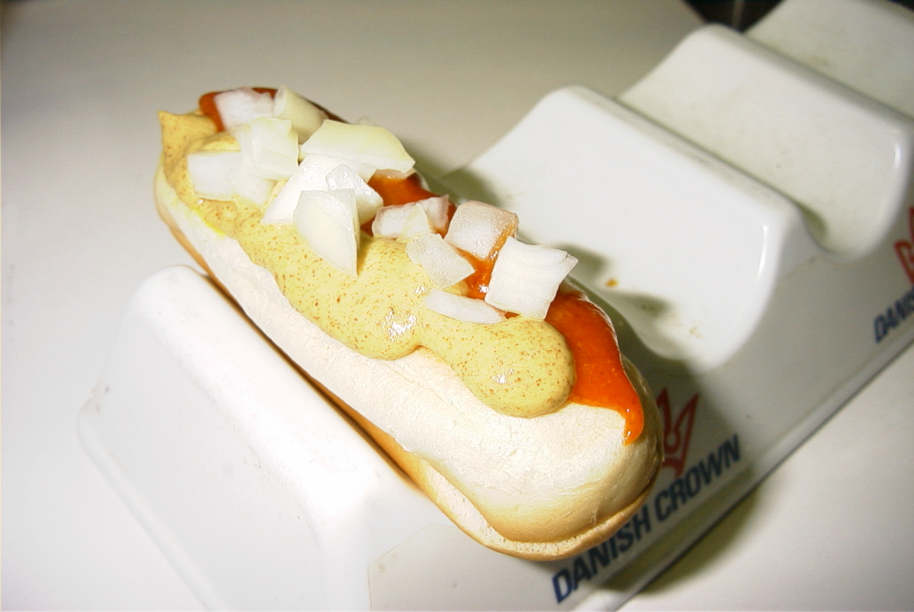 Klassisk kradser med ketchup, sennep og rå løg.